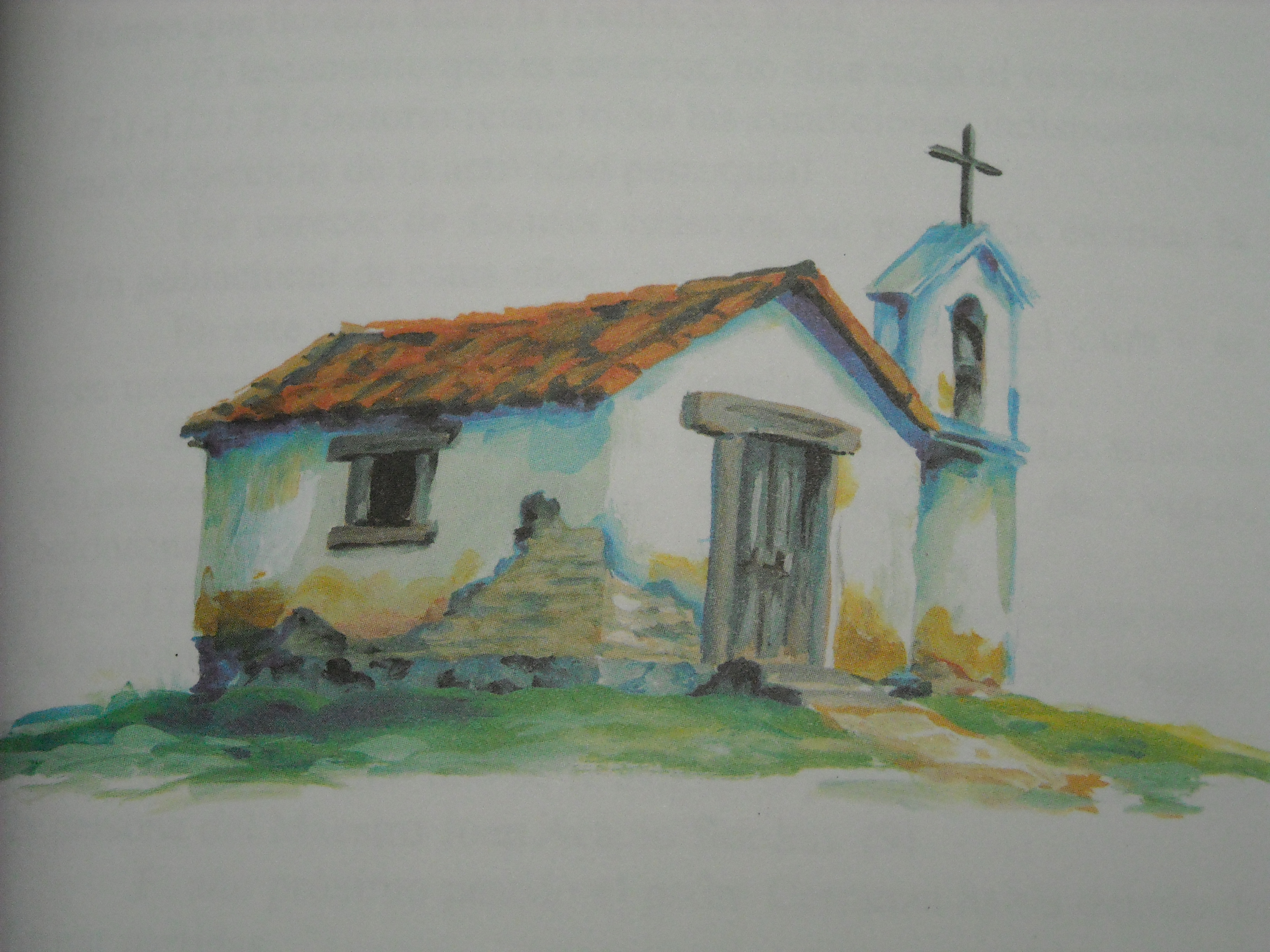 Boceto qeu muestra como podrìa haber lucido originariamente la capilla de San José OBrero en sus primeros tiempos. La islustracièn fue realizada por Bachi Delorto interpretando la infromacièn recolectada sobre la capilla por parte de historiadores locales